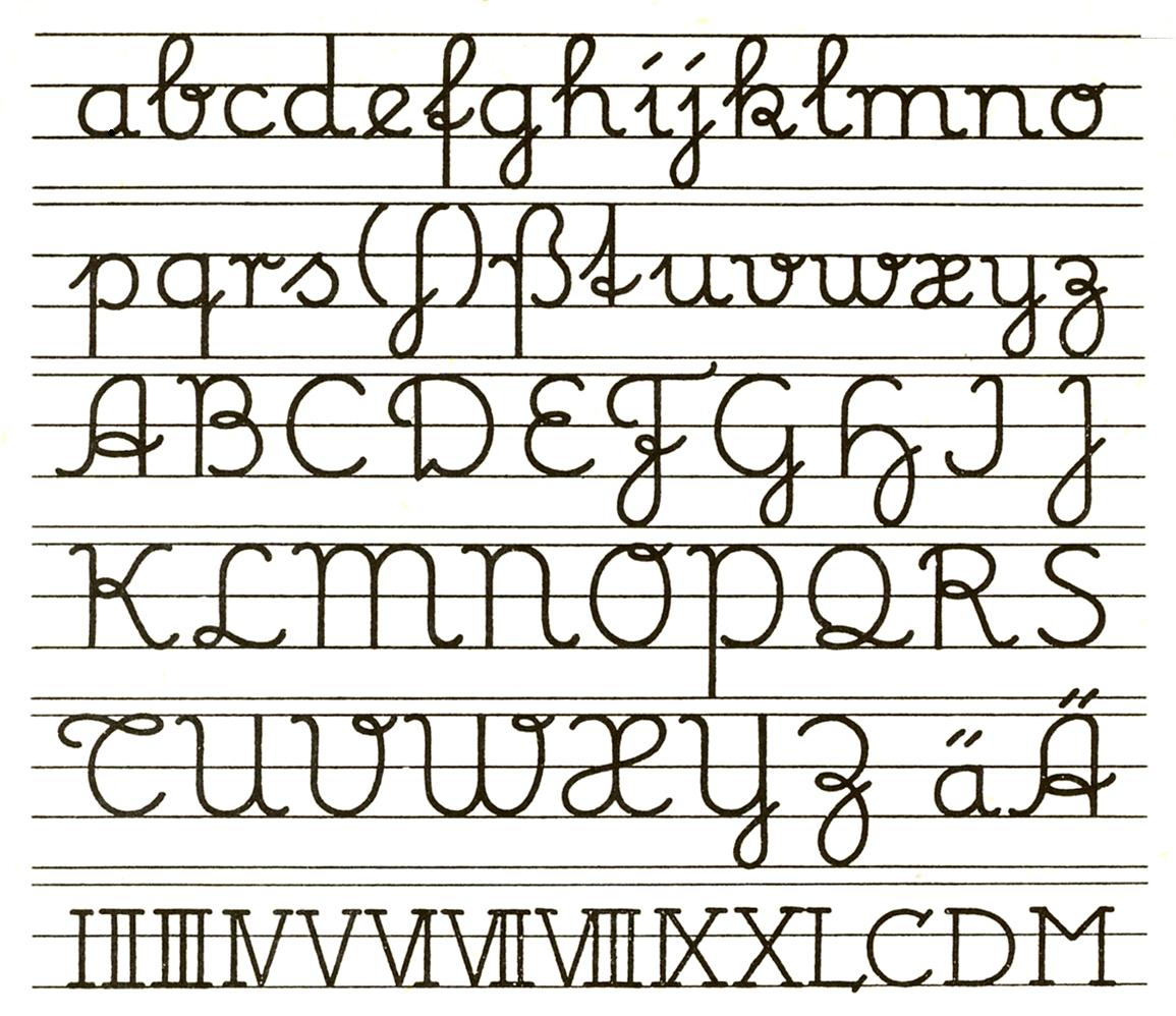 Ludwig Sütterlin: Lateinisches Alphabet mit Schnurzug